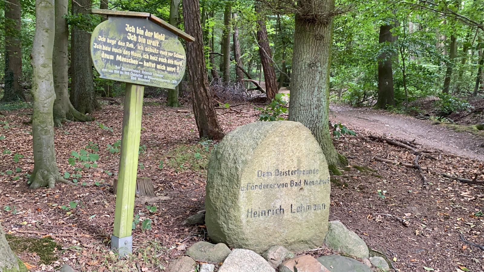 Gedenkstein mit der Inschrift „Dem Deisterfreunde u. Förderer von Bad Nenndorf Heinrich Lehmann“ Links neben dem Findling wurde eine Tafel aufgestellt mit der Aufschrift „Ich bin der Wald. Ich bin uralt. Ich hege das Reh, ich schütze vor Schnee. Ich bau euch das Haus, ich heiz euch den Herd, drum Menschen - haltet mich wert. Der Deisterfreund Heinrich Lehmann war von 1905 bis 1919 Chorleiter im Männergesangsverein v. 1879 Bad Nenndorf“